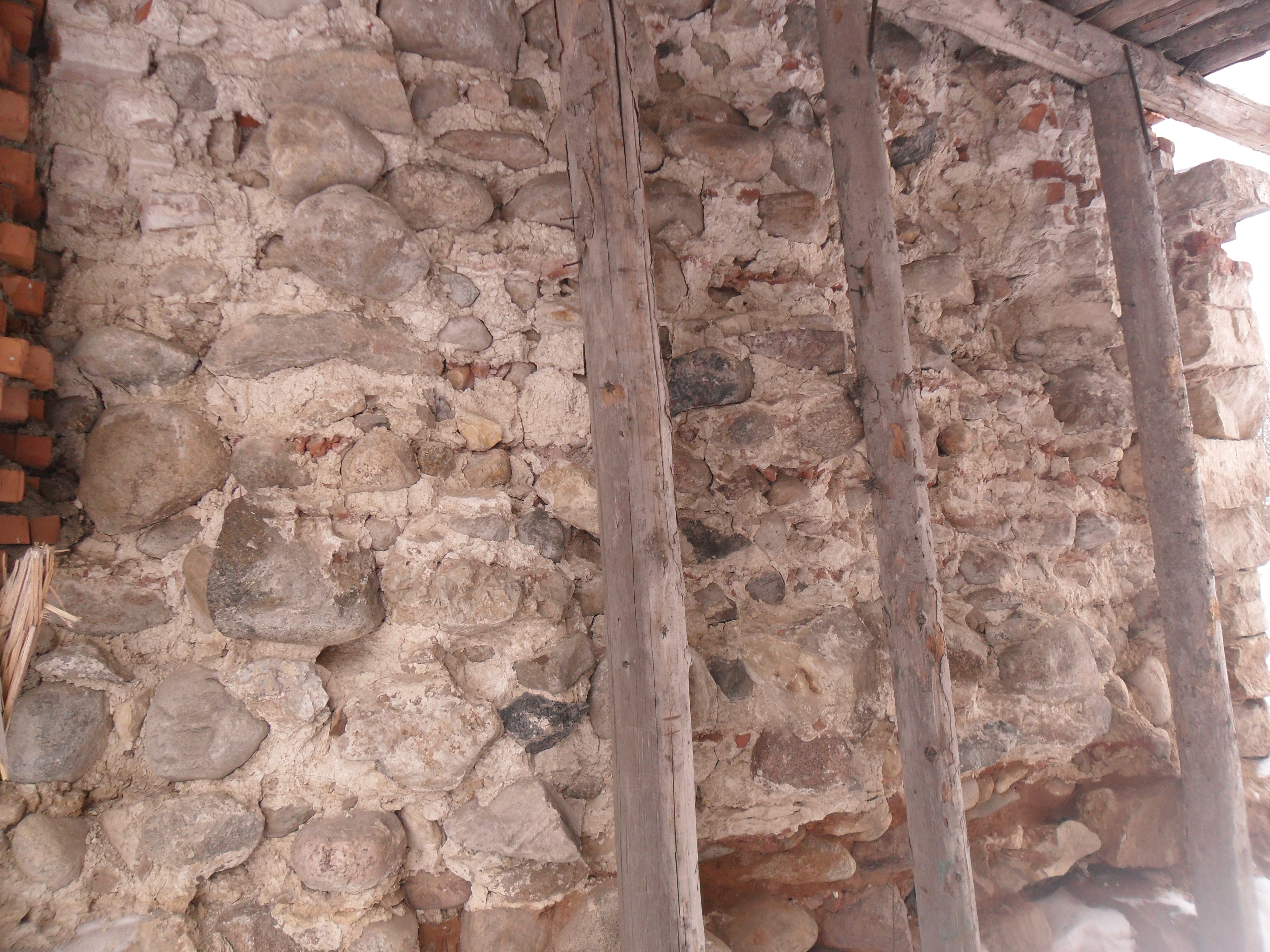 Фрагмент внутренней кладки Смоленской крепостной стены.